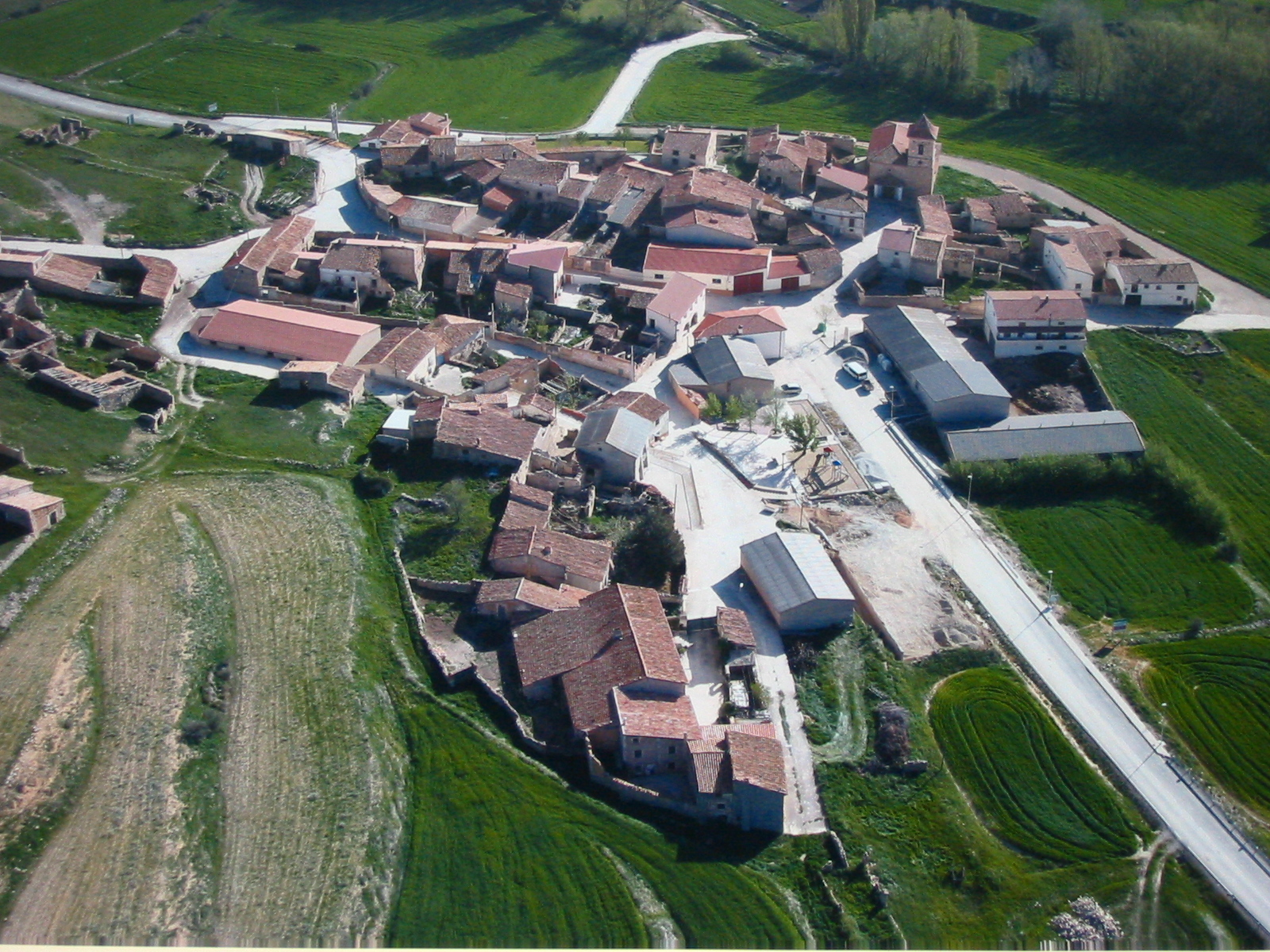 Aragonés: Aguatón (Tergüel, Aragón)Aguatón desde el aire